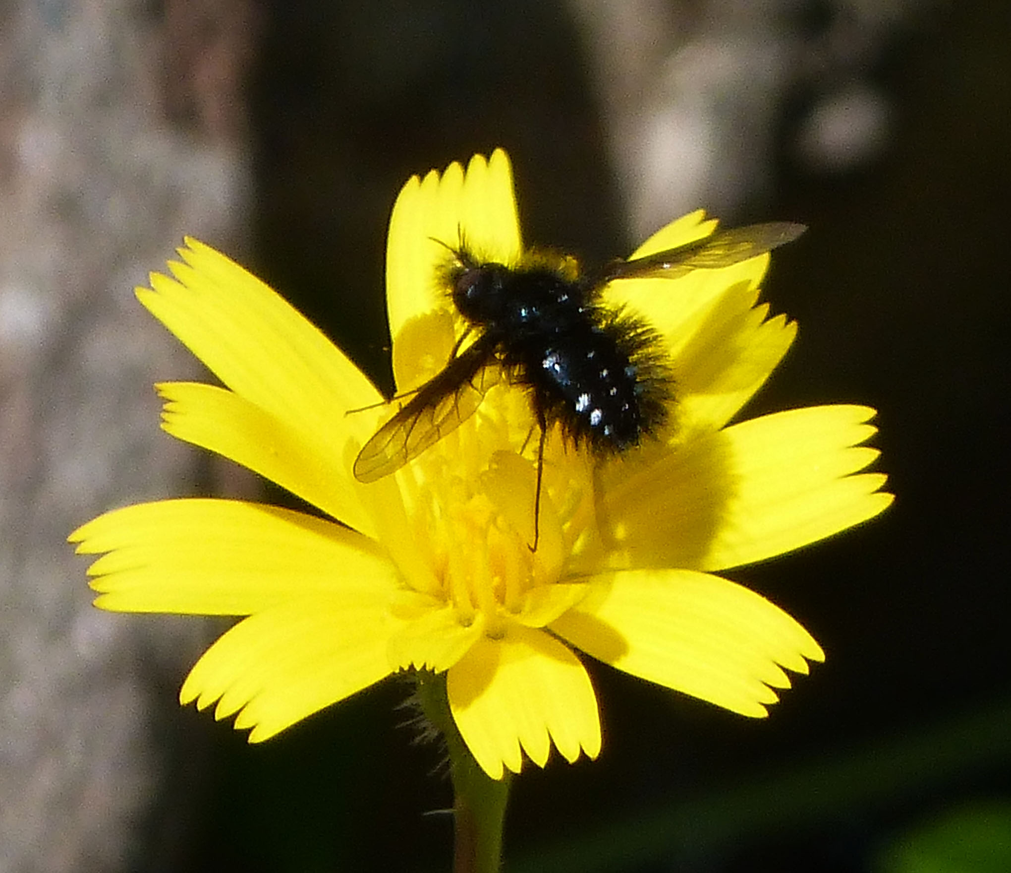 Alcornocales N.P. Andalucia, Spain